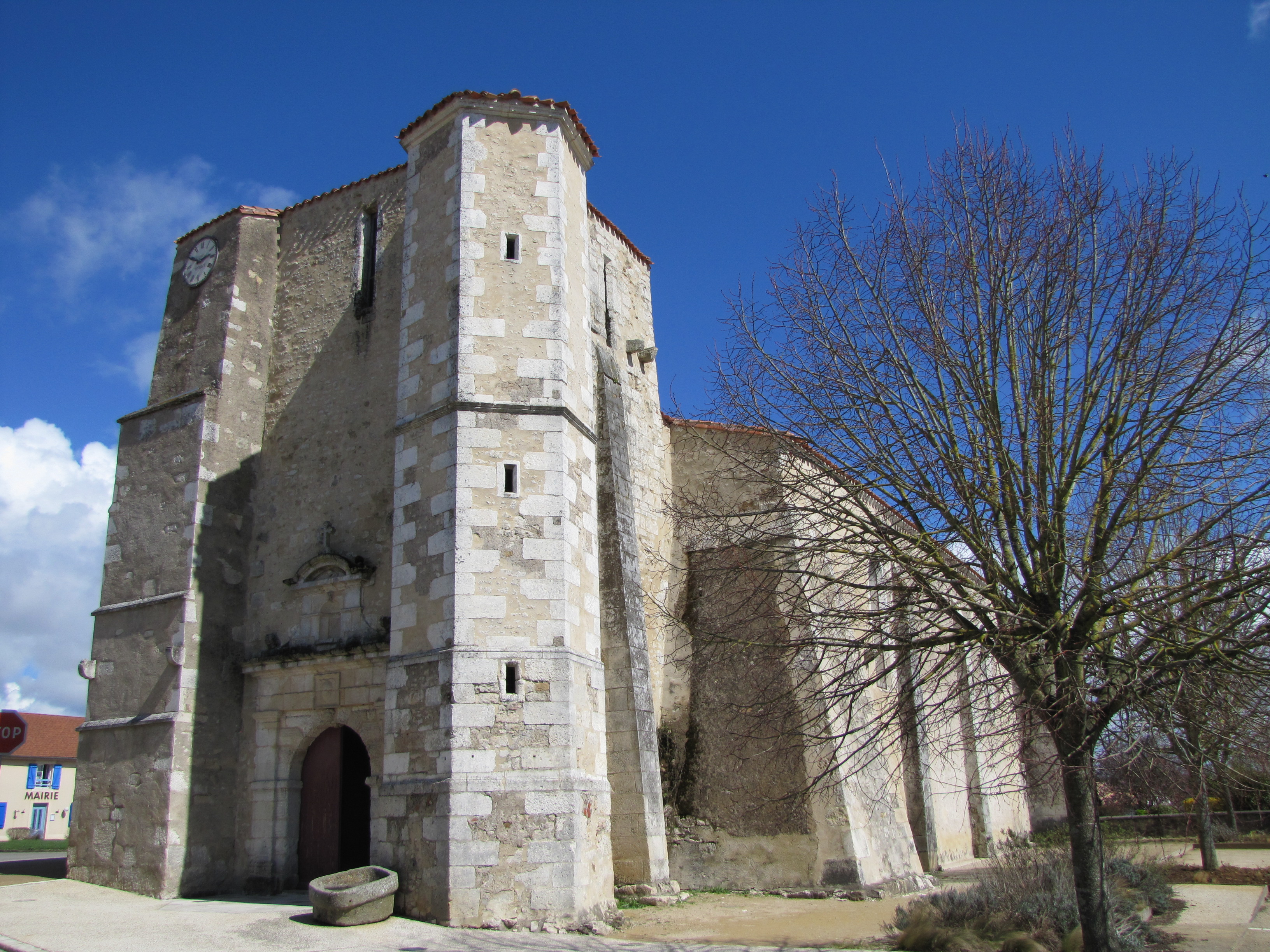 Église Saint-Benoît de Saint-Benoist-sur-Mer